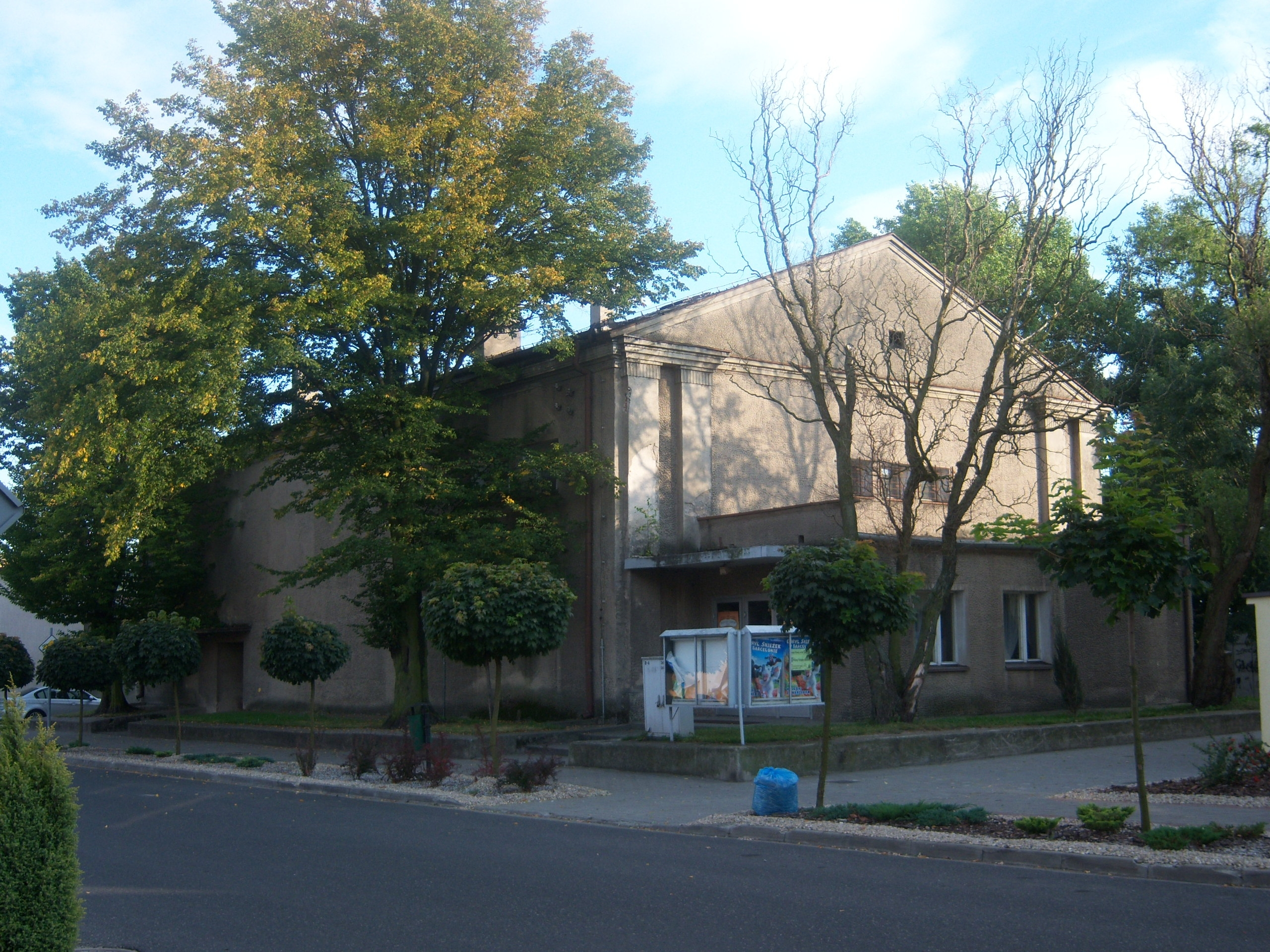 Dawna synagoga, obecnie kino w Kleczewie